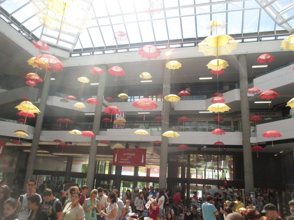 Le centre Bonlieu pendant le festival international du film d'animation d'Annecy 2015